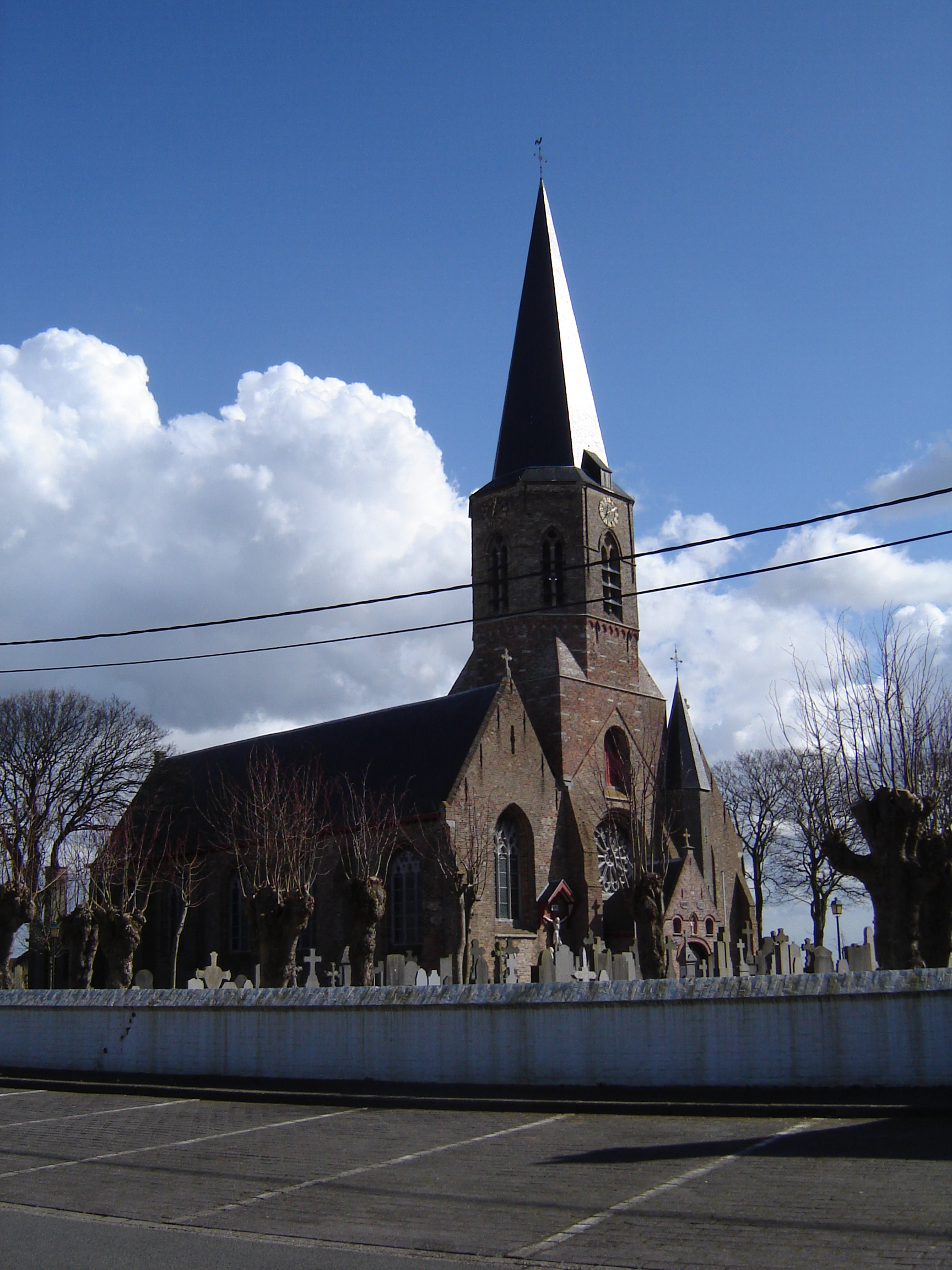 Sint-Clemenskerk in Klemskerke Church of Saint Clement in Klemskerke, De Haan, West Flanders, Belgium